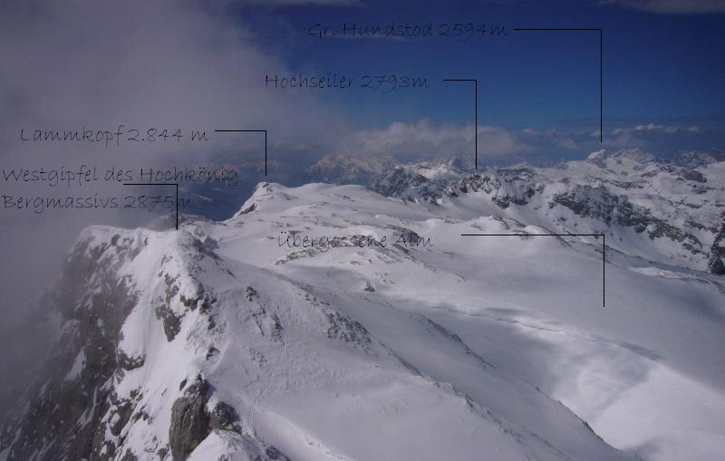 Blick vom Gipfel des Hochkönig Richtung Westen (mit Lammkopf, Hochseiler, Großer Hundstod)